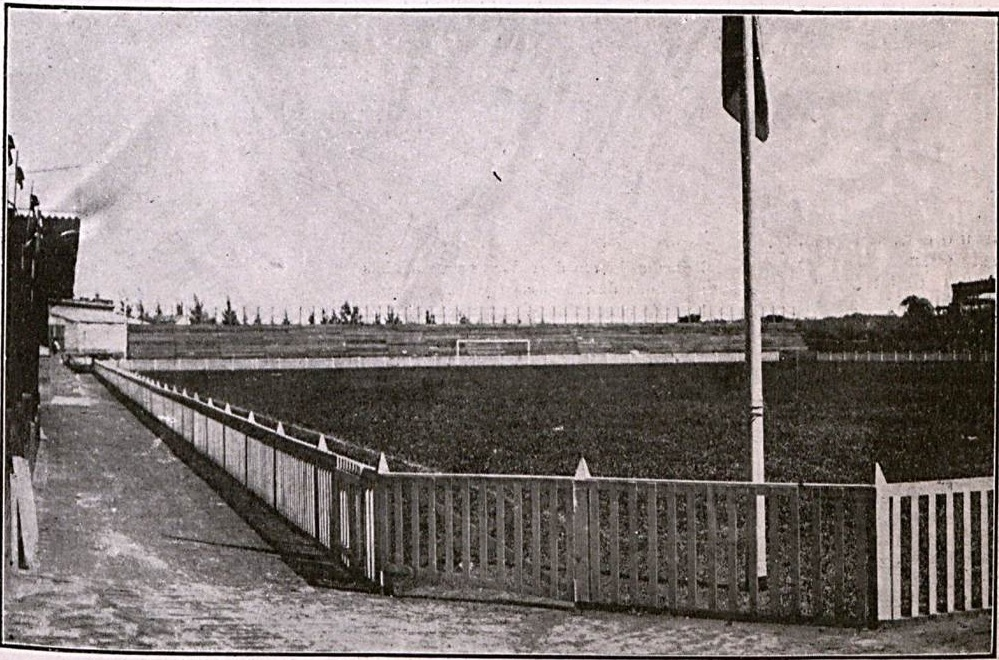 Aspecto do campo do Estadio da Ponte Grande durante sua inauguração.